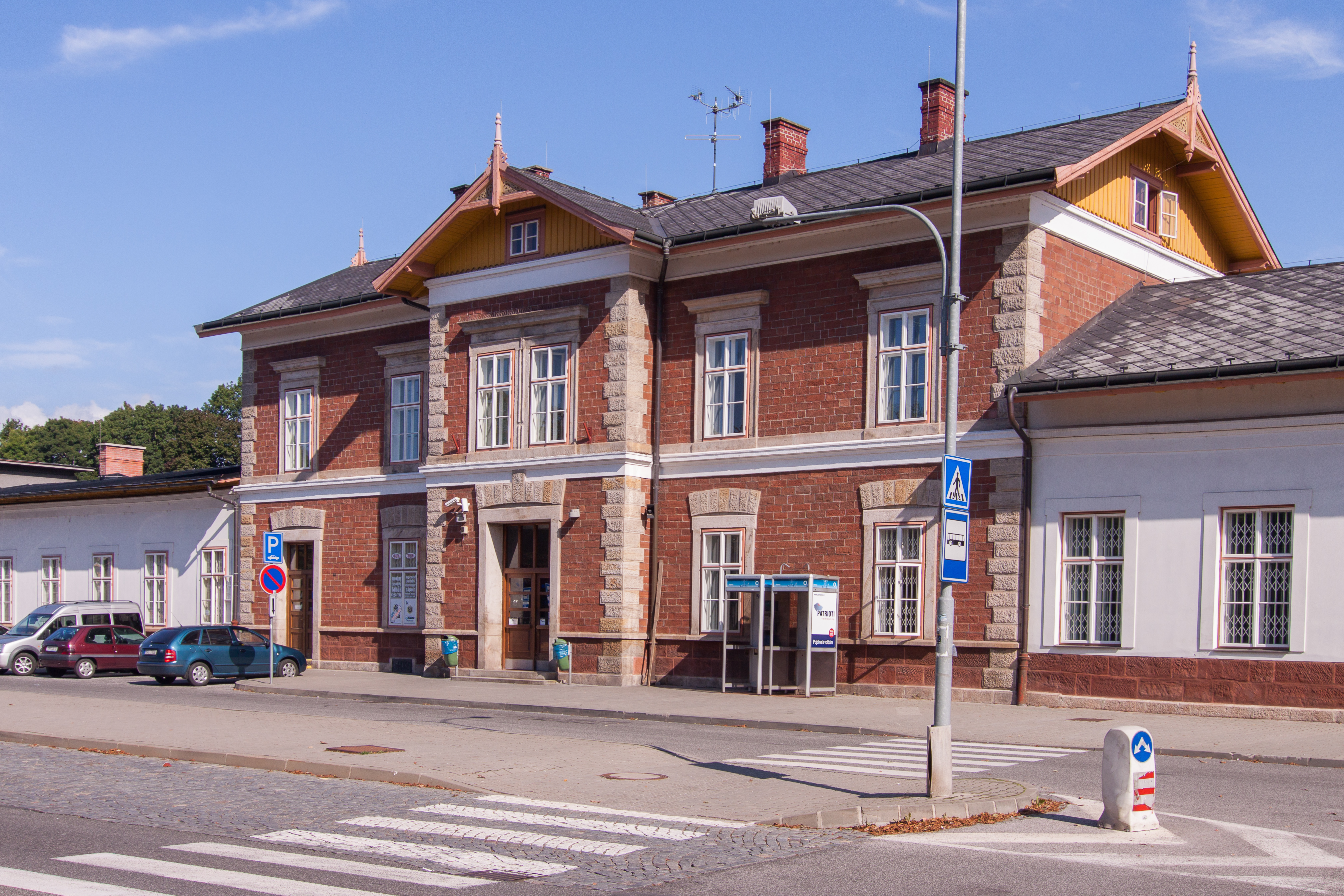 Železniční stanice Hlavní nádraží Trutnov, z toho jen: výpravní budova (Trutnov), Trutnov 56